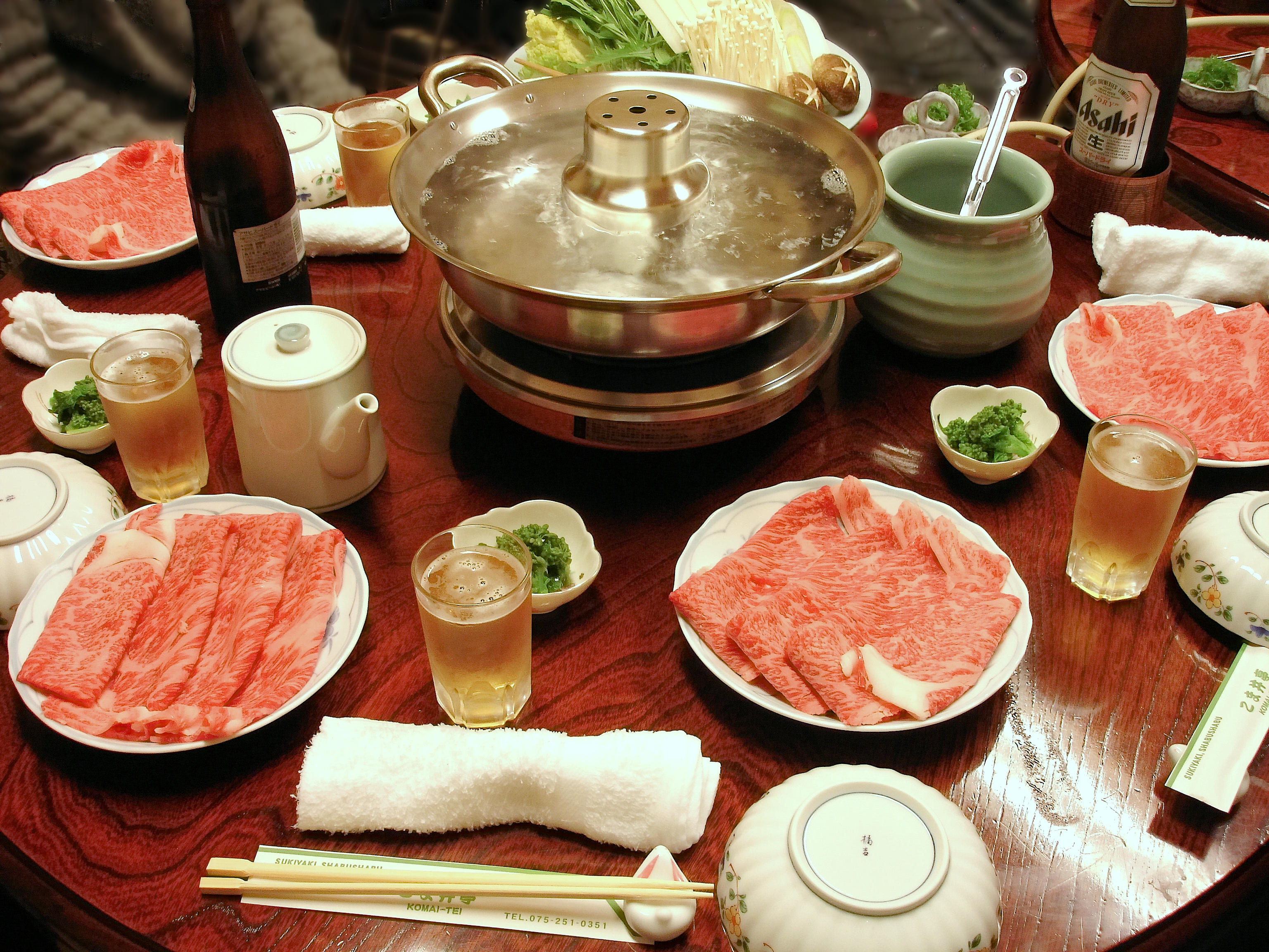 Fertig angerichtetes Shabu-shabu-Essen (mit Rindfleisch) für vier Personen in einem japanischen Restaurant in Kyōto. Hier mit elektrisch beheiztem Feuertopf.